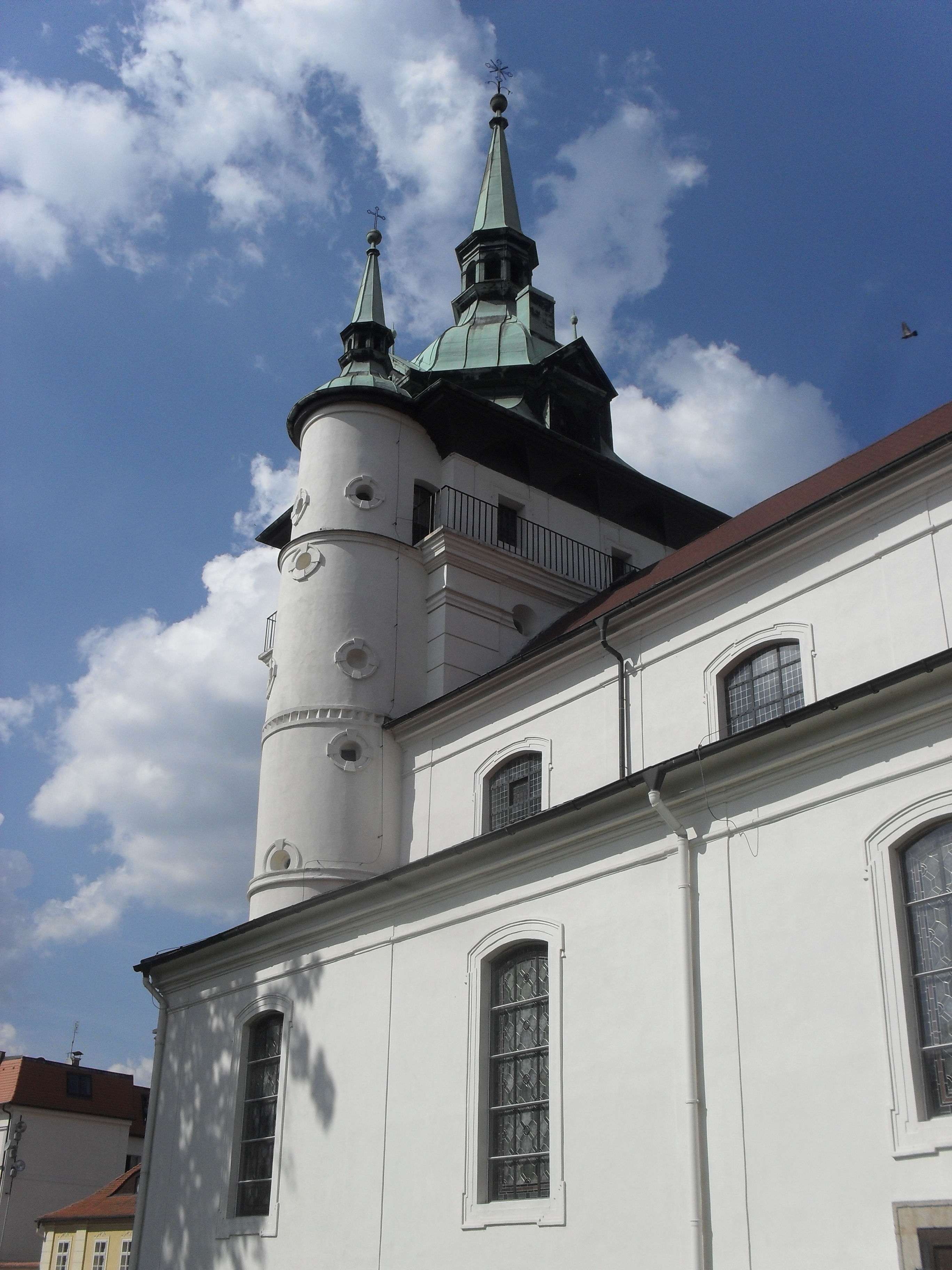 TTO: Kostel sv. Jana Křtitele (Teplice)- Teplice, Zámecké náměstí 135.